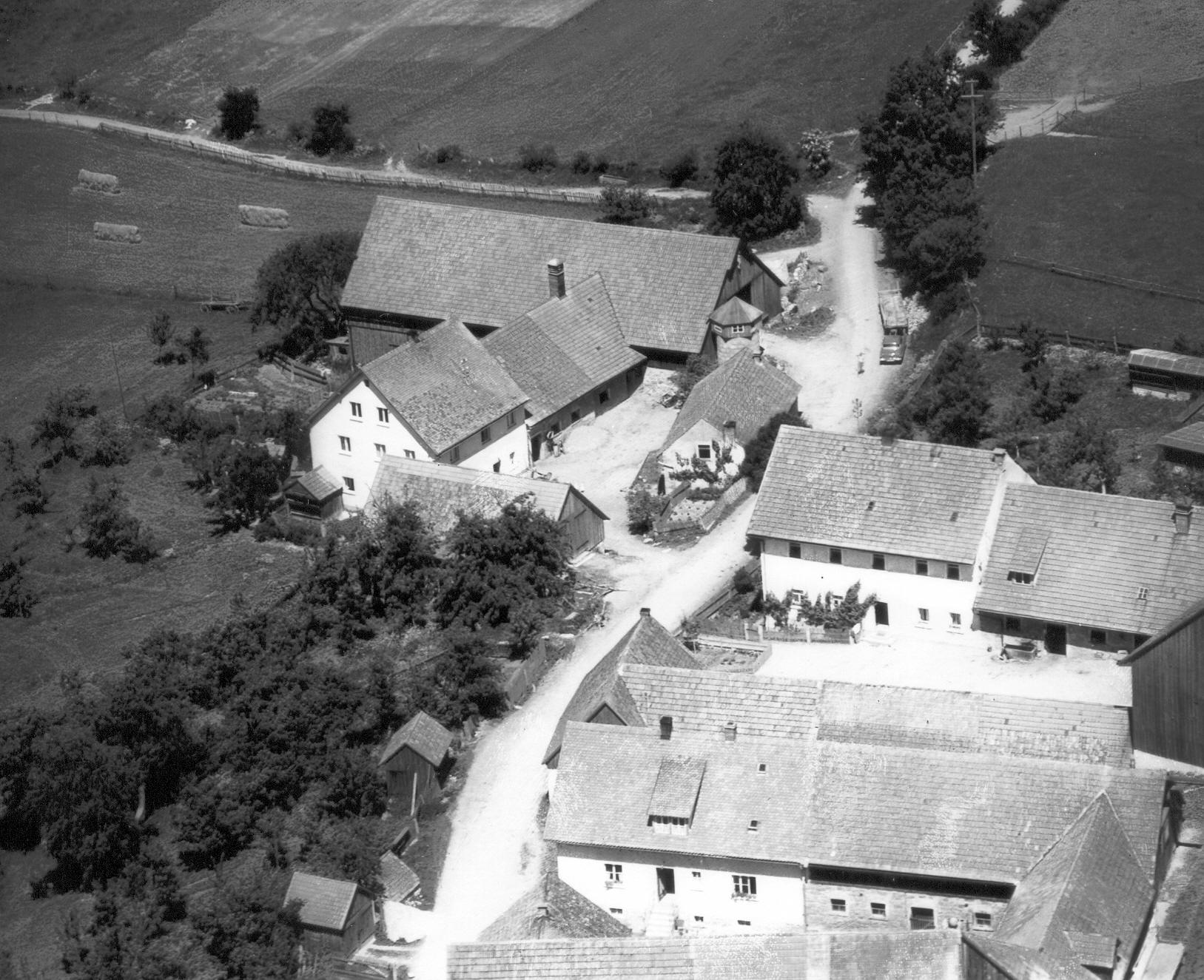 Der Weiler Steinach im Jahre 1960